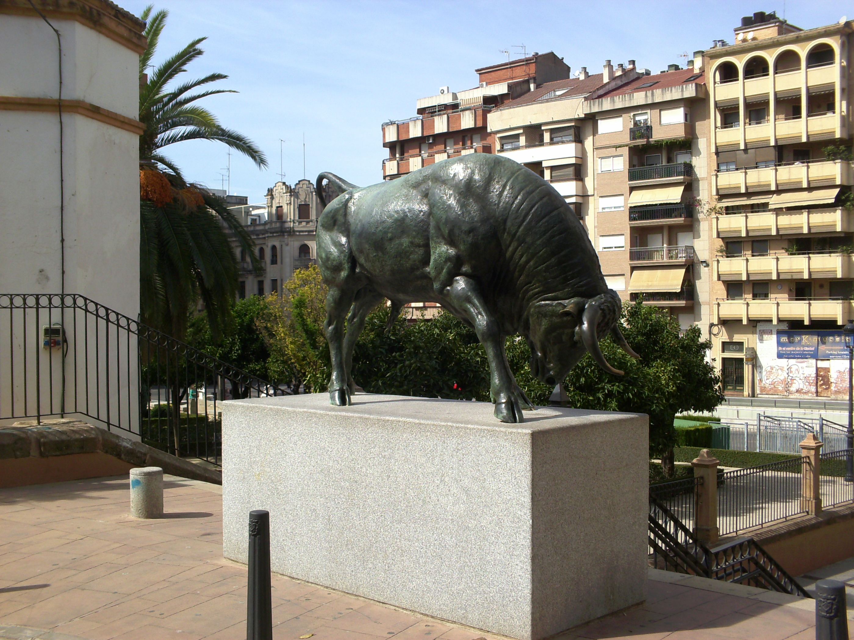 Monumento al Toro Bravo, en Linares.